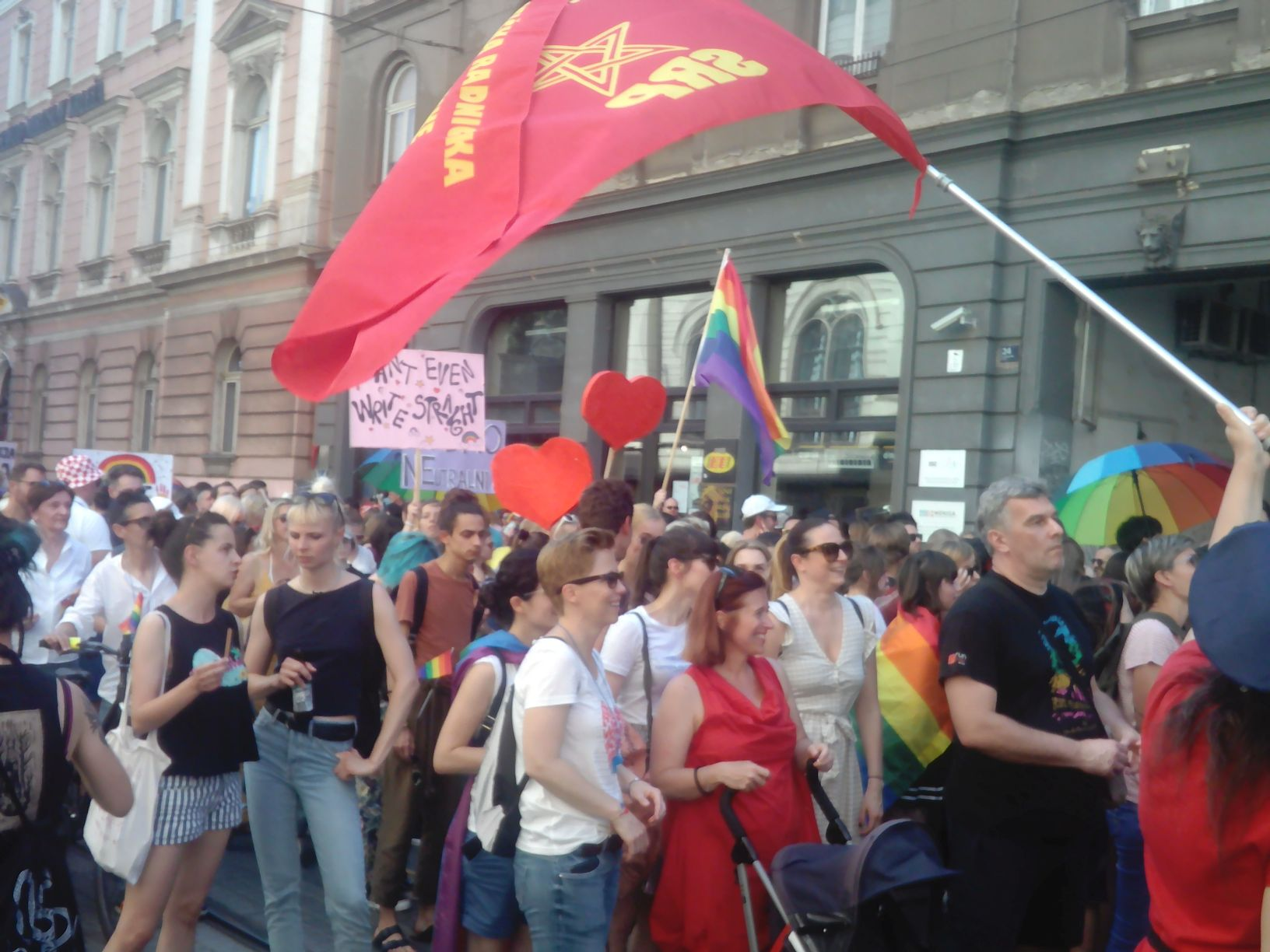 Socijalistička radnička partija Hrvatske na Zagreb Prideu 2019.